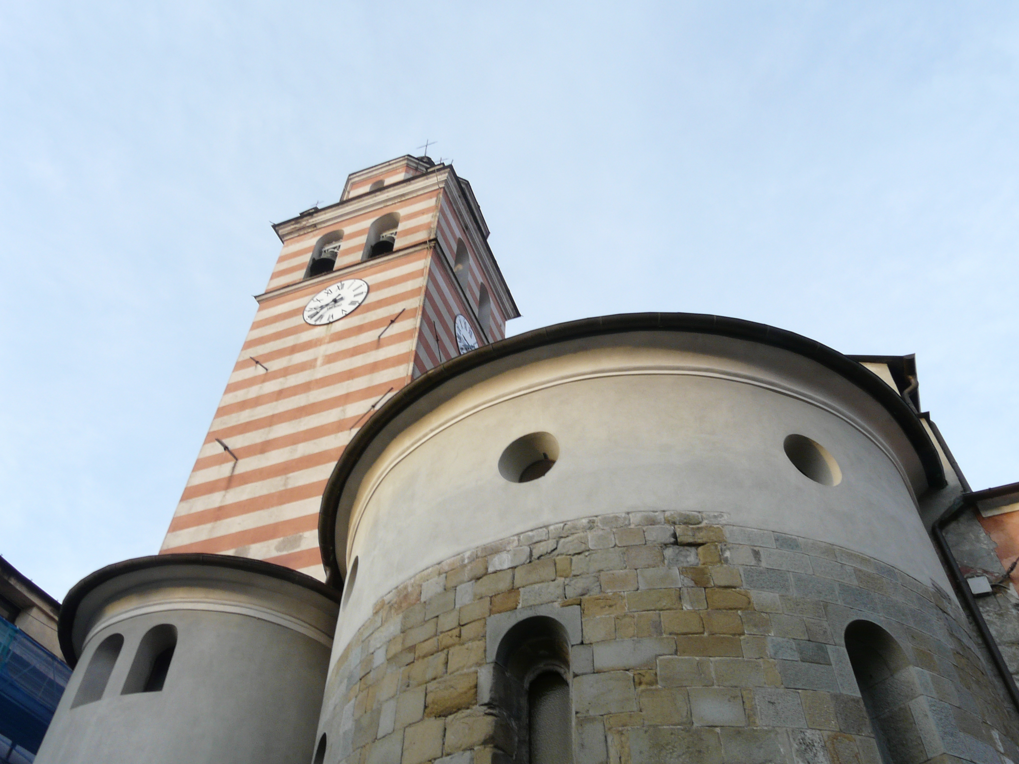 Abside della cattedrale di Brugnato, Liguria, Italia